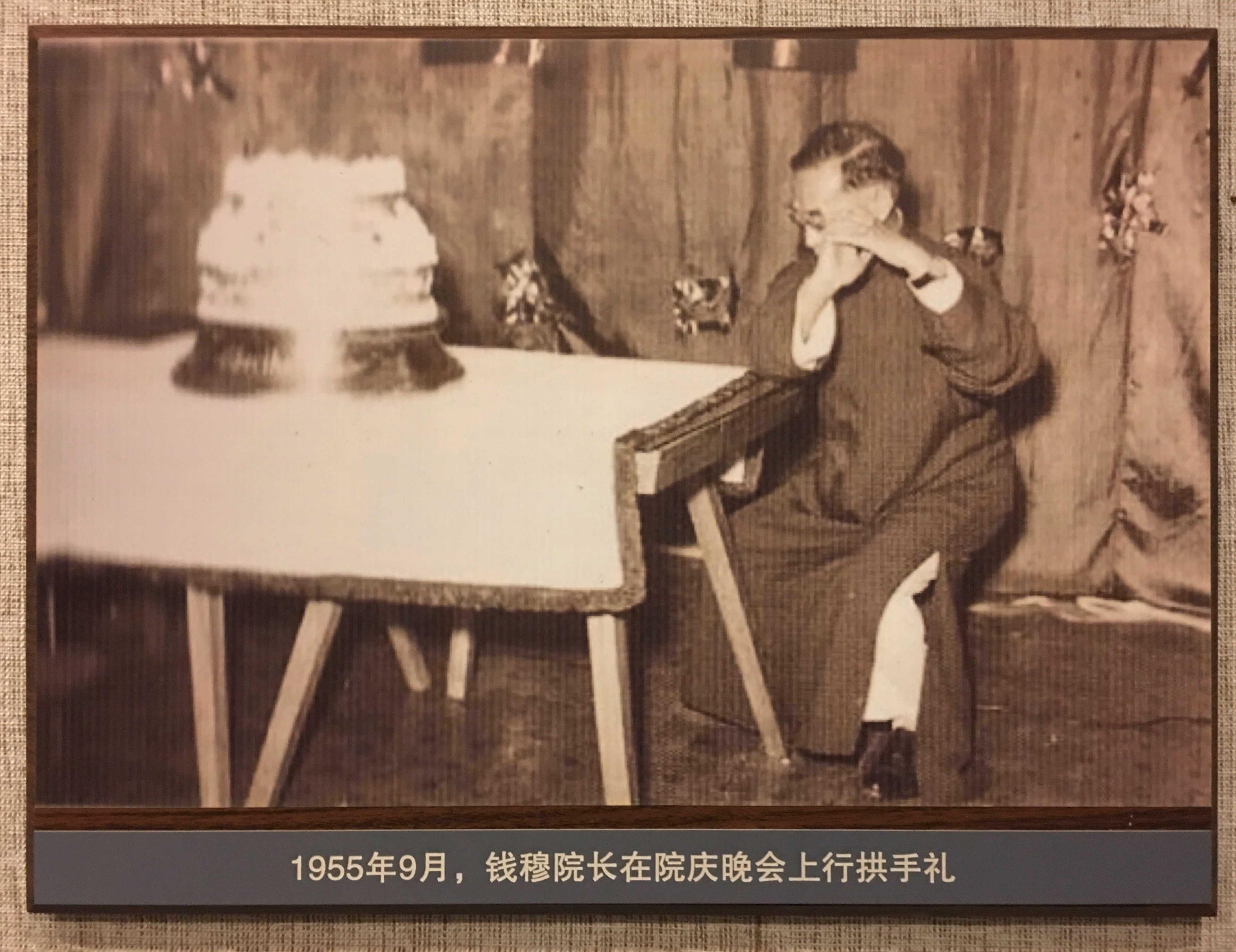 1955年，正在行抱拳禮的錢穆